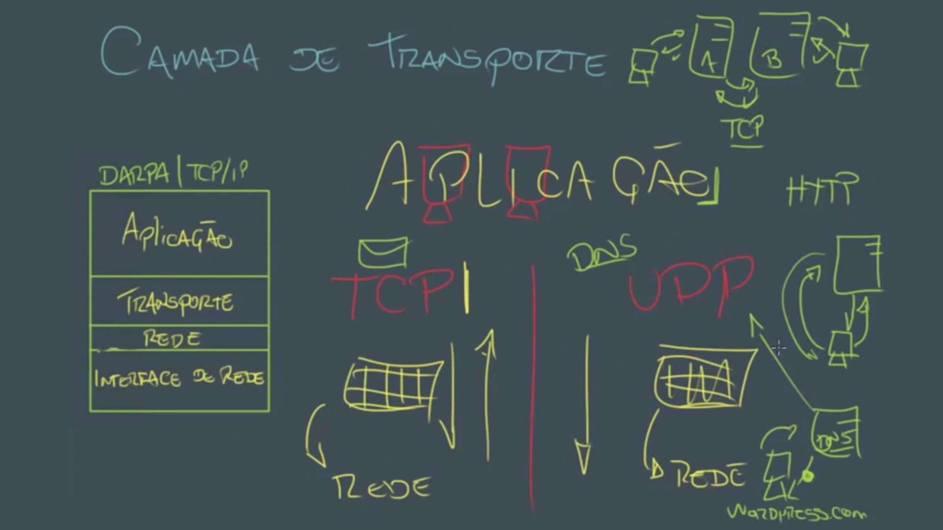 Camada de Transporte - TCPIP